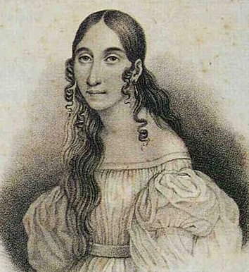 Giuseppina Strepponi (1815–1897), italienische Opernsängerin und zweite Ehefrau von Giuseppe Verdi.